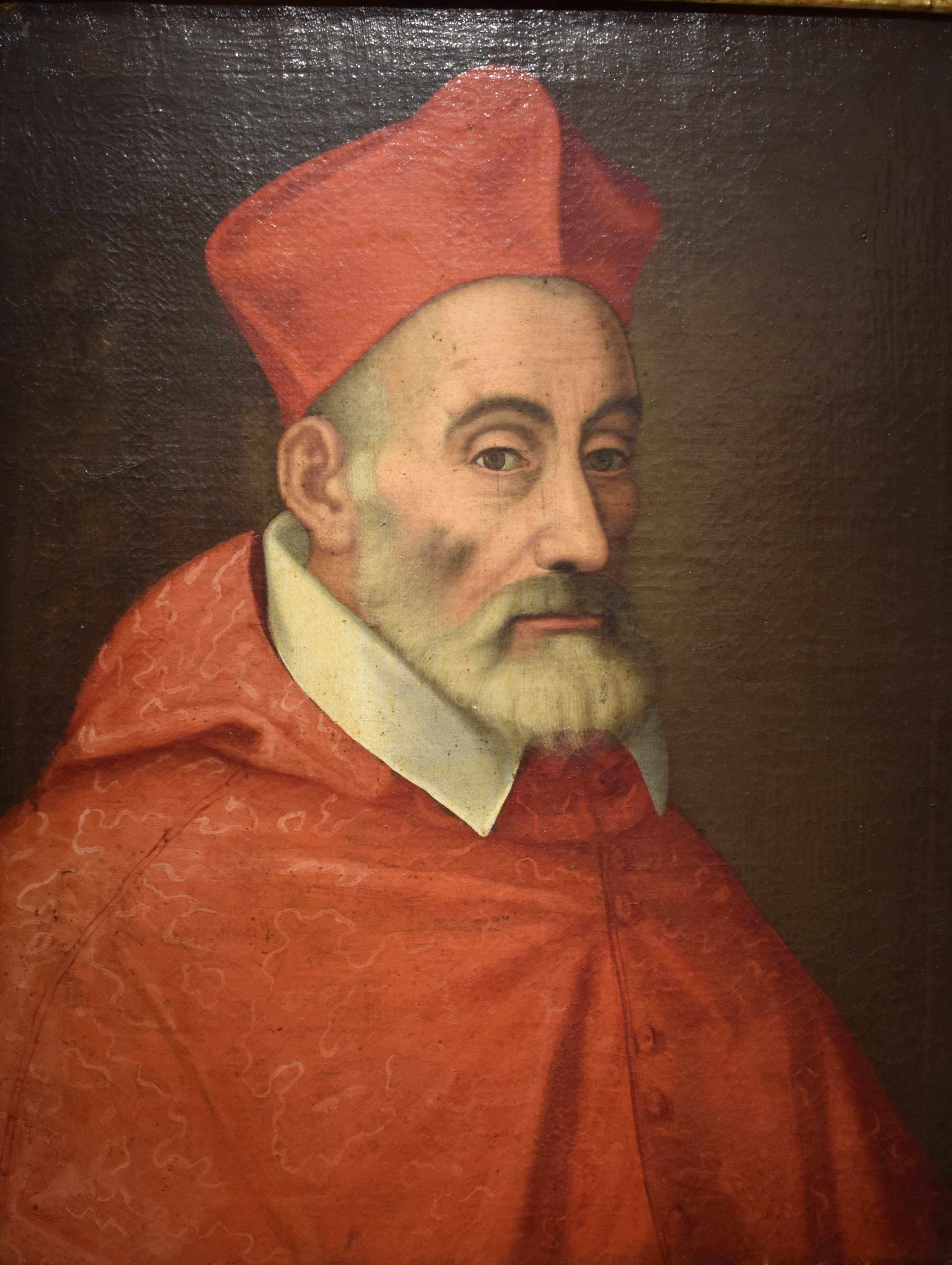 Ritratto del cardinale Gabriele Paleotti, olio su tela, cm 59 x 45, Pinacoteca Domenico Inzaghi, Budrio This is a photo of a monument which is part of cultural heritage of Italy.